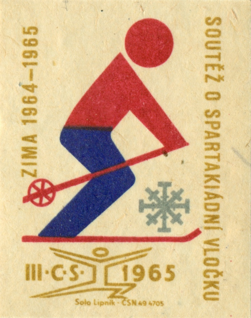 nálepka z roku 1965